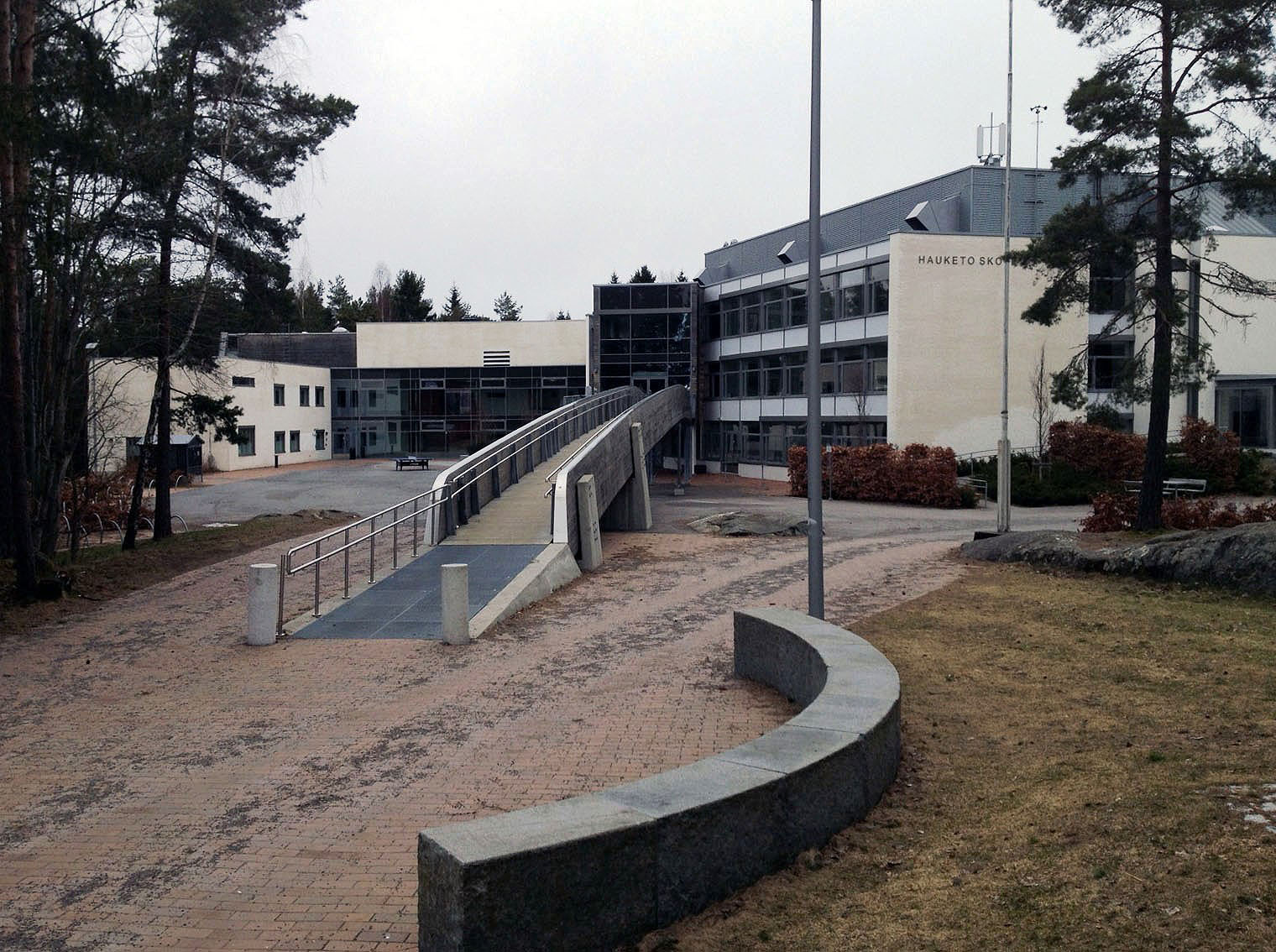 Hauketo skole i Oslo 2014